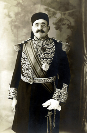 Abdeljelil Zaouche (coll. privée)